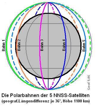 NNSS-Navigationssystem, Idealkonfiguration der Bahnen Bahnneigung ca. 90° Polarbahnen), Flughöhe anfangs 1100 km (in der Skizze ~2fach überhöht)